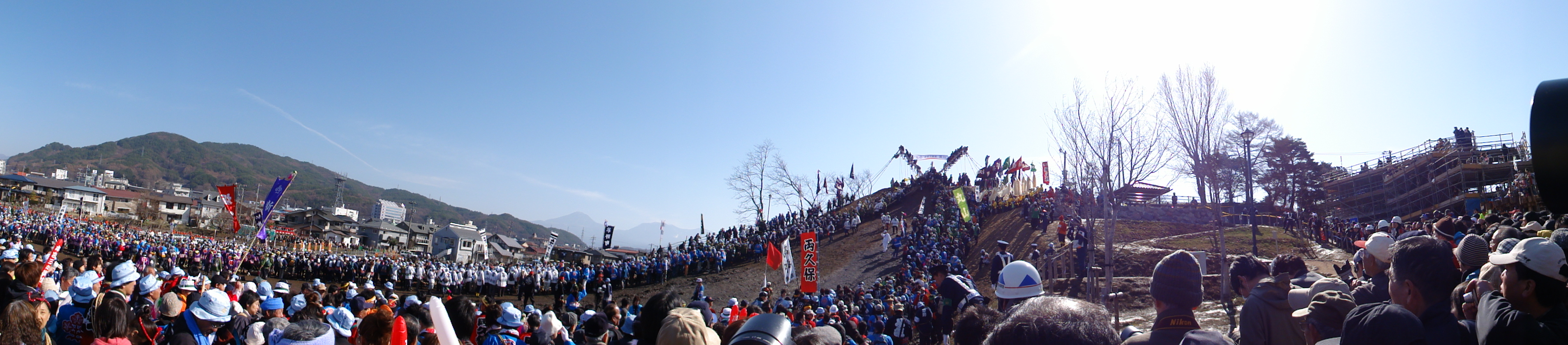 茅野市の御柱祭、木落し坂